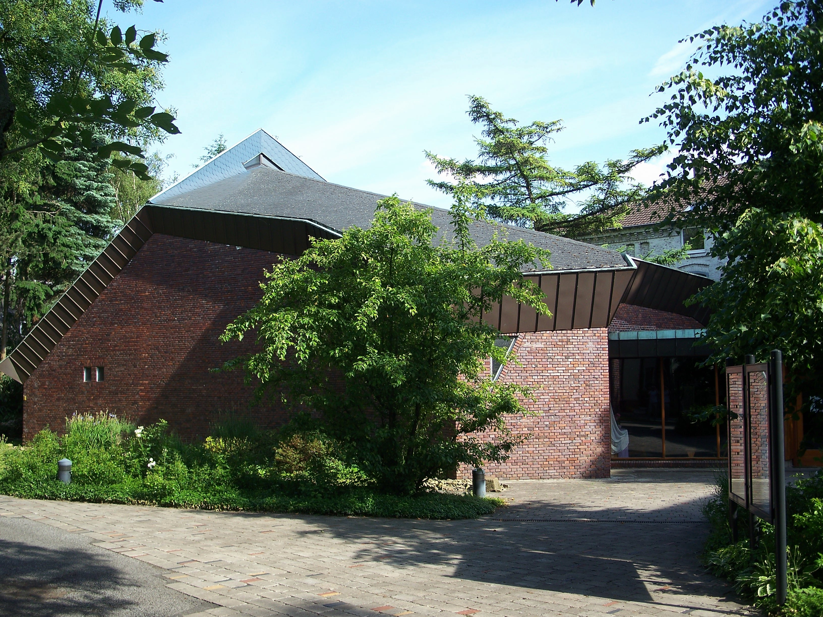 Kirche der Johannesgemeinde, entworfen von Hans Scharoun